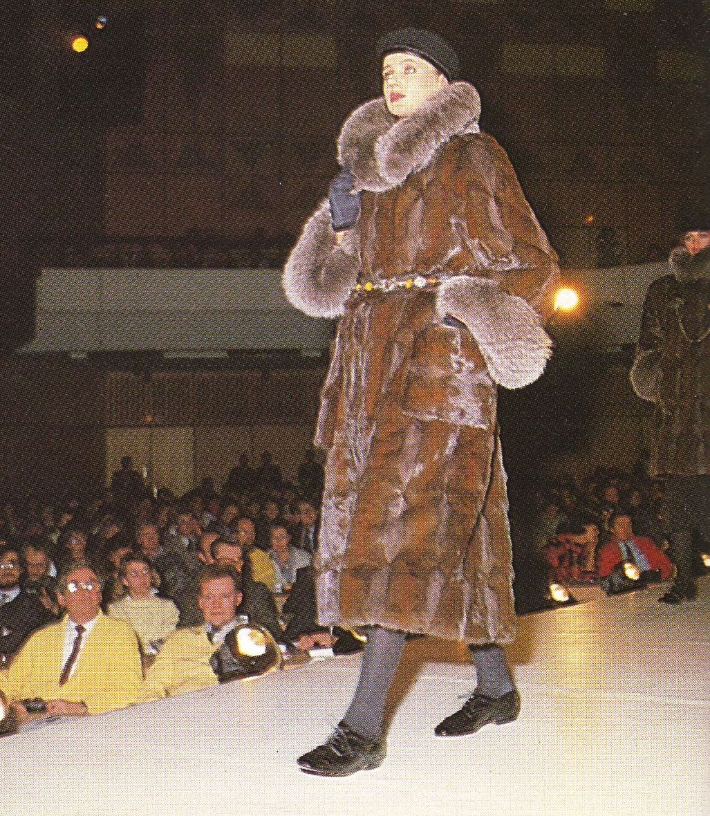 Pelz-Trendmodelle 1986/87 des Modeausschusses des Zentralverbands des Kürschnerhandwerks in Aachen. Kanadisch Fehmantel mit Fuchs. Birgit Salomon, Essen.